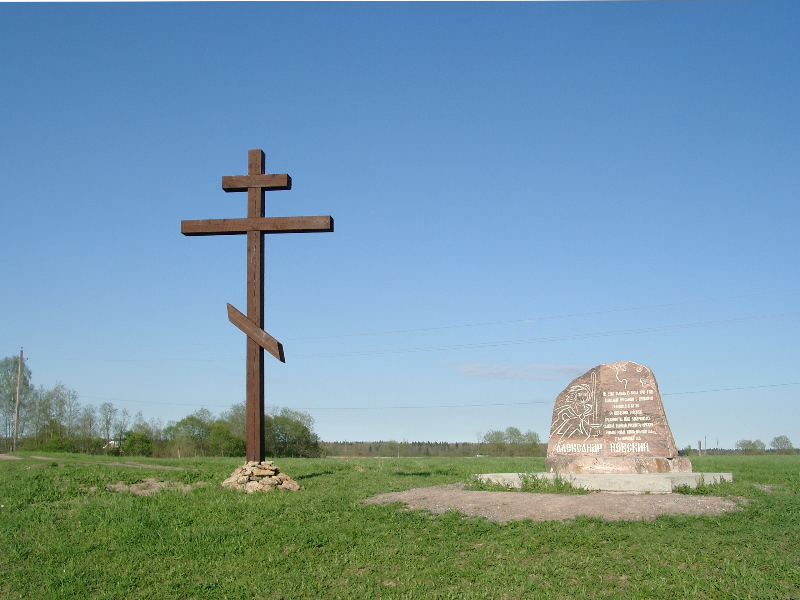 Крест и стела — памятный знак на месте стоянки Александра Невского перед битвой со шведами. Тосненский район Ленинградской области.